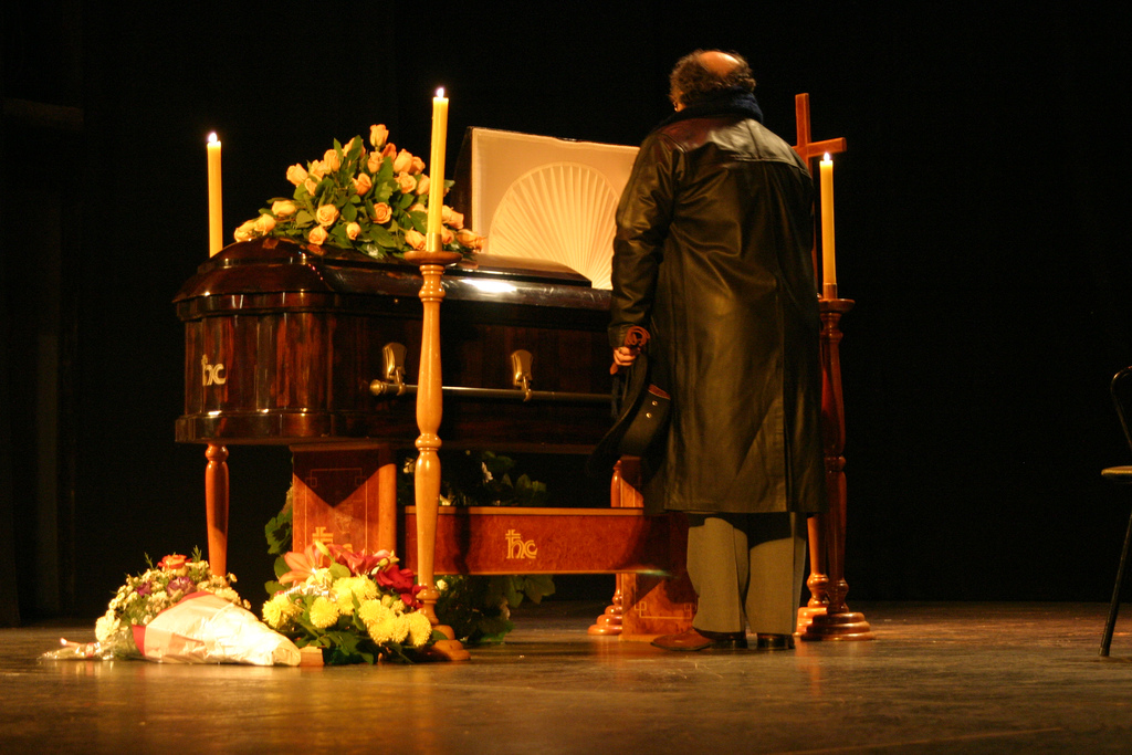 Velorio del comediante chileno Eduardo Thompson.